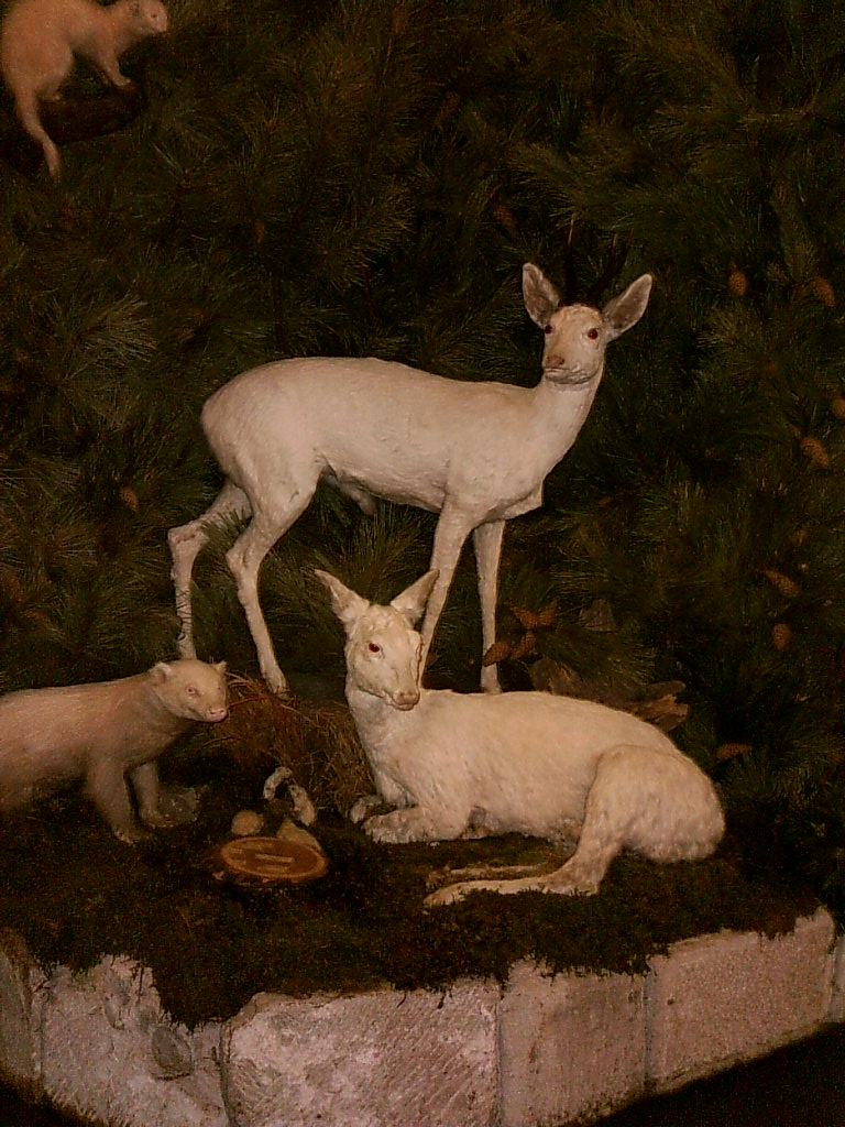 Albinismus, verschiedene Tierpräparate im Carl-Schweizer-Museum, Murrhardt